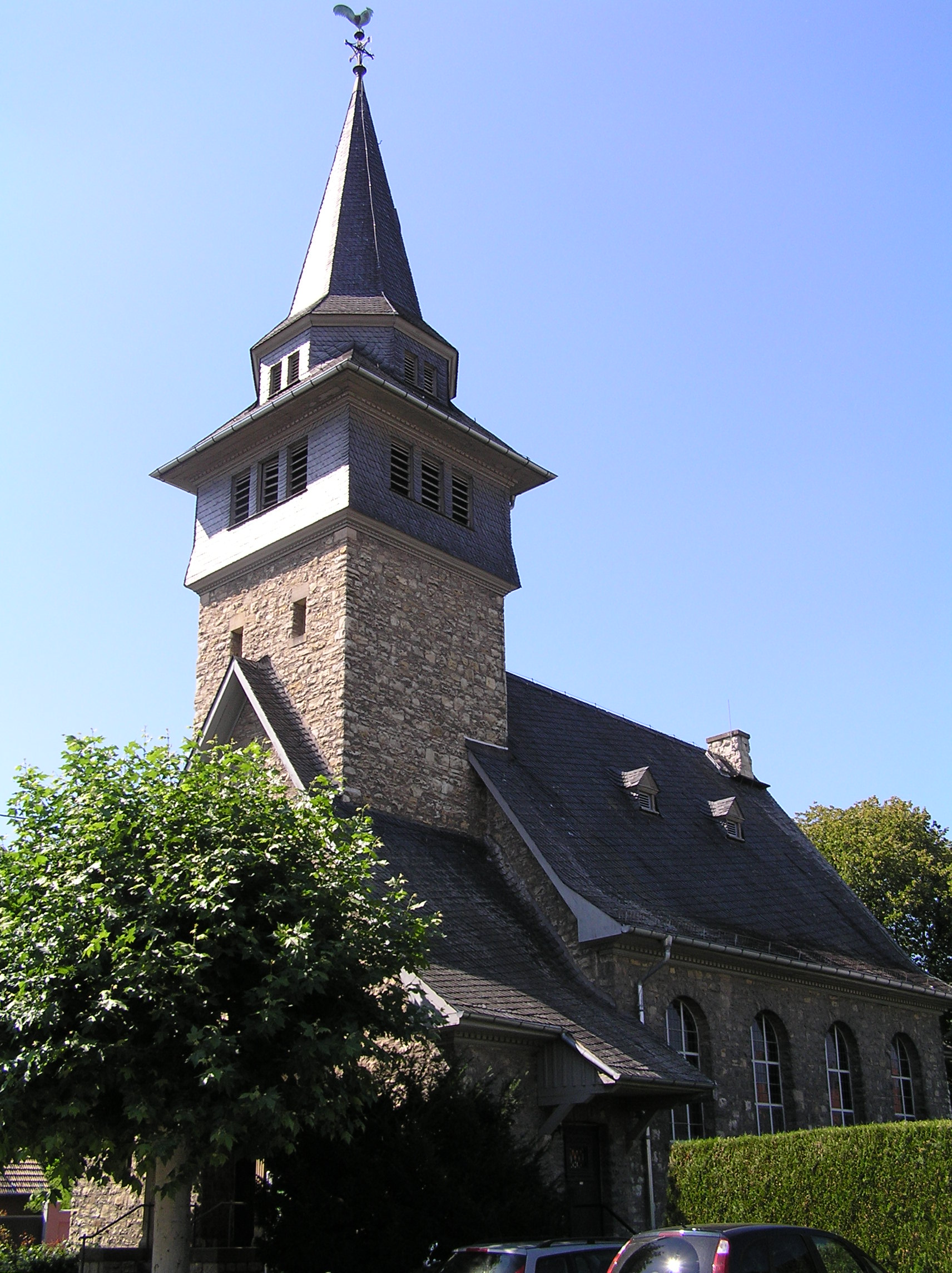 Ev. Gustav-Adolf Kirche in Frei-Weinheim im August 2010